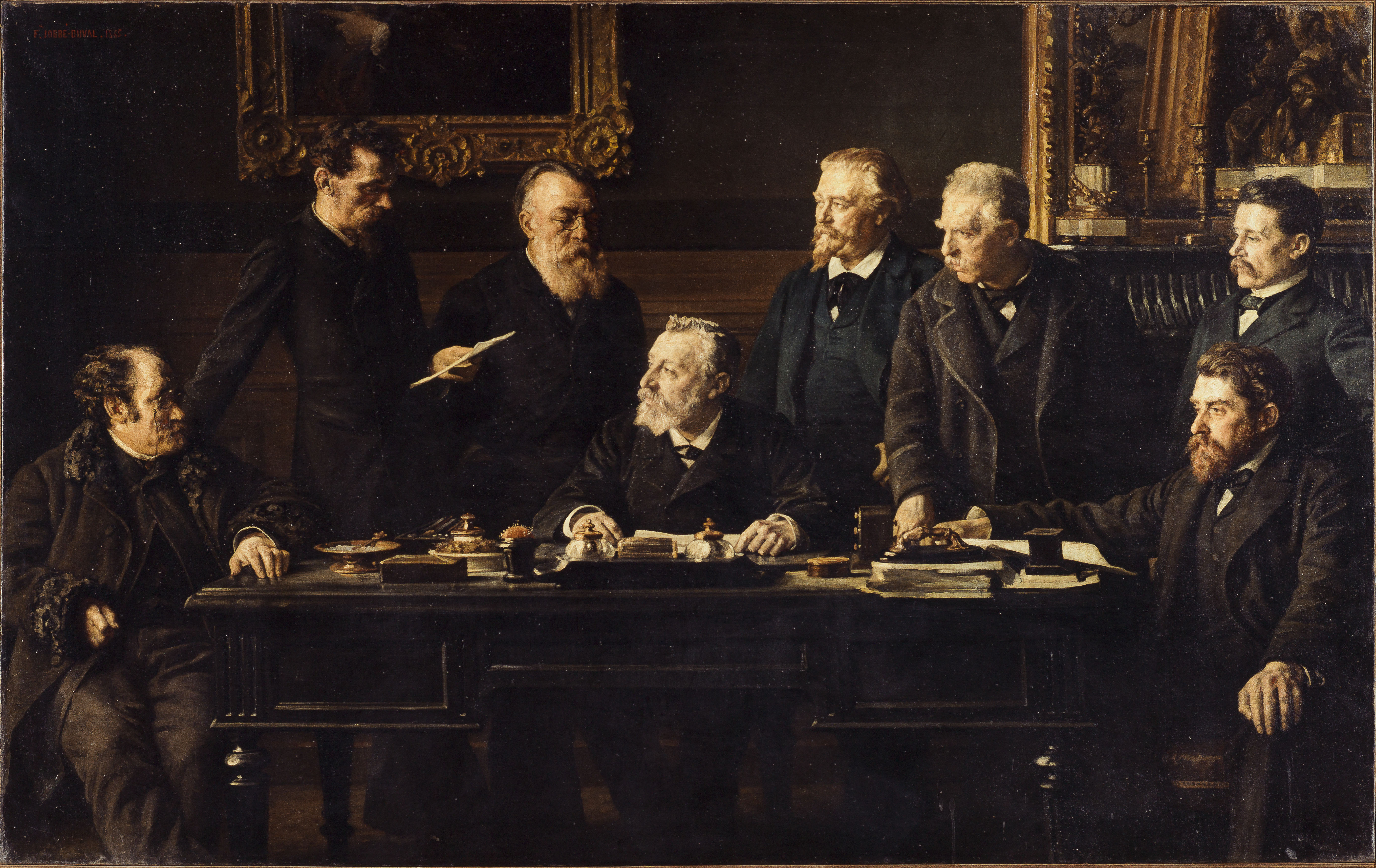 "Le bureau du Conseil Municipal, en juillet 1883" : Réunis autour du président Henri Mathé, assis au centre, de gauche à droite : Camille Dreyfus, secrétaire ; Gustave Mesureur, syndic ; Alphonse Darlot, vice-président ; Émile Level, secrétaire ; Félix Jobbé-Duval, vice-président ; Joseph Michelin, assis, secrétaire ; Charles Amouroux, secrétaire. Au verso, esquisse d'une danseuse.